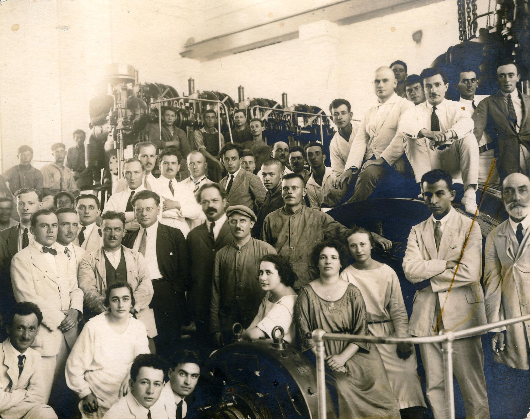 תמונה קבוצתית של עובדי חברת החשמל בתוך תחנת הכוח הראשונה, 1923